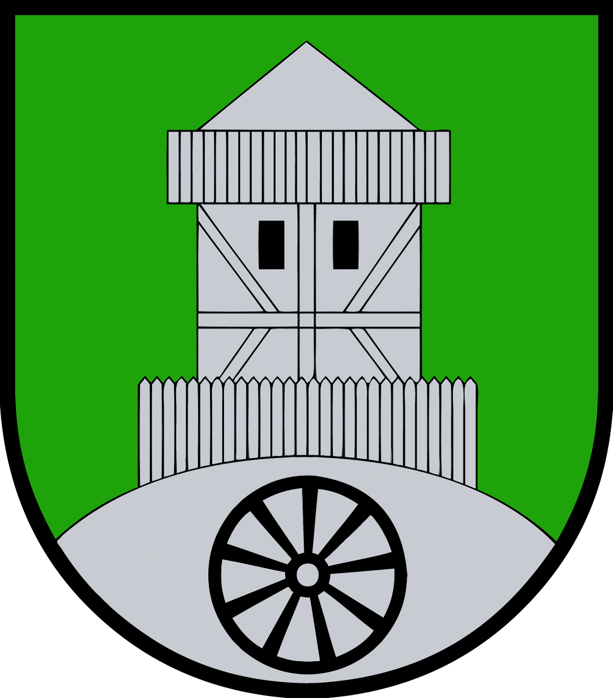 Wappen der ehemaligen Gemeinde Großradl, Steiermark